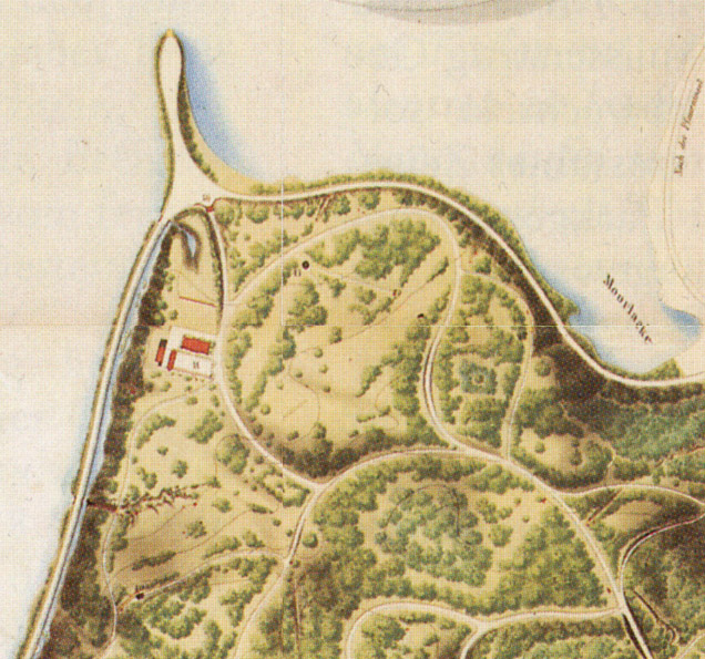 Kraatzplan 1862, Jägerhofpartie